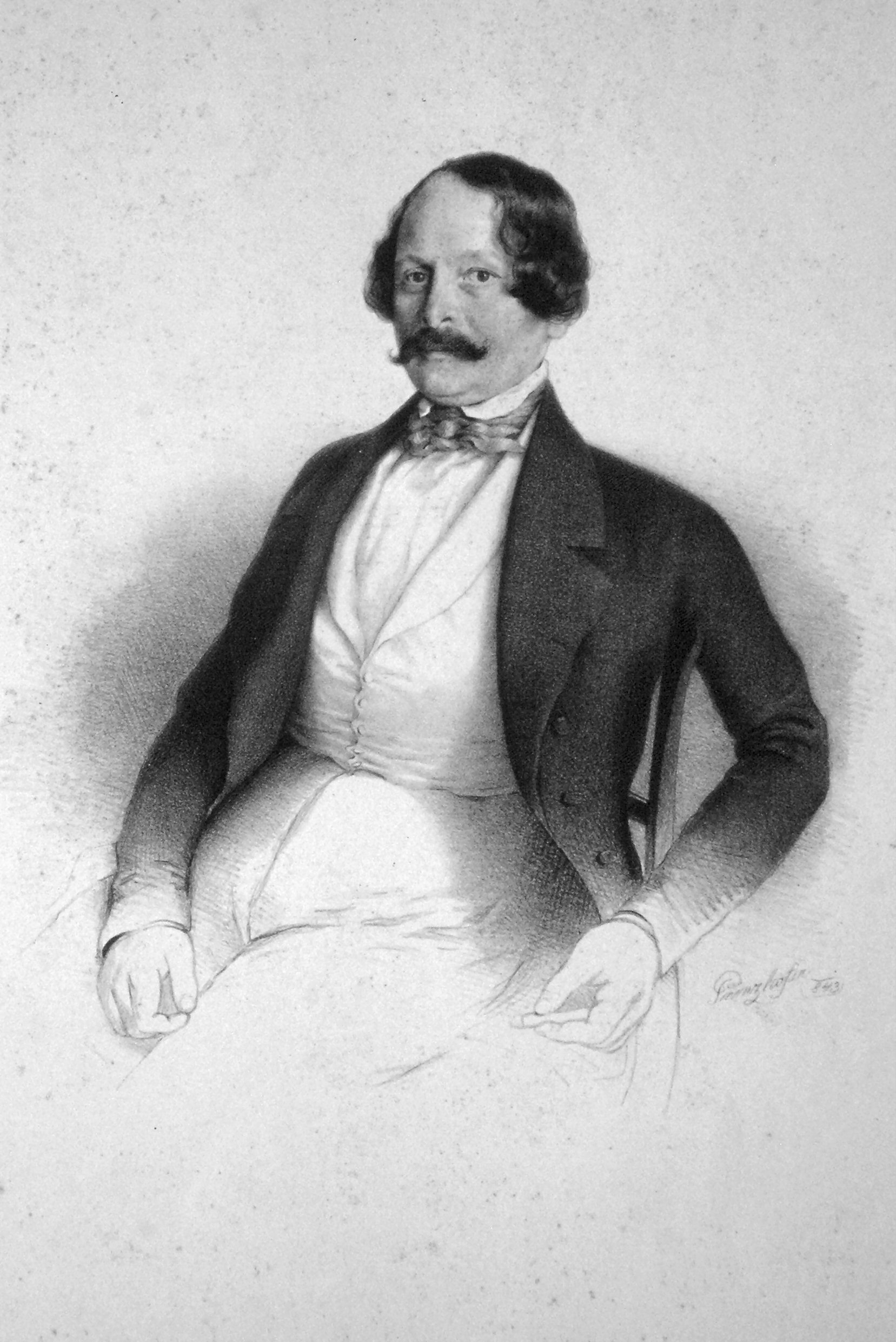 Eugen von Dickmann (1793-1863), Freiherr von Sacheran. Österreichischer Industrieller. Lithographie von August Prinzhofer, 1843.